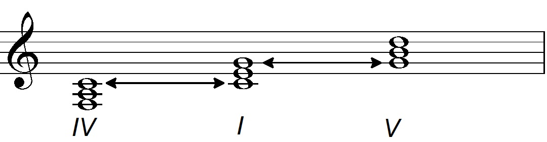 Relaciones entre los Grados Tonales